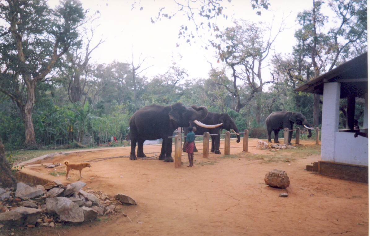 വയനാട്ടിലെ മുത്തങ്ങ ആനവളർത്തൽ‍ കേന്ദ്രത്തിൽ നിന്നുമുള്ള ദൃശ്യം